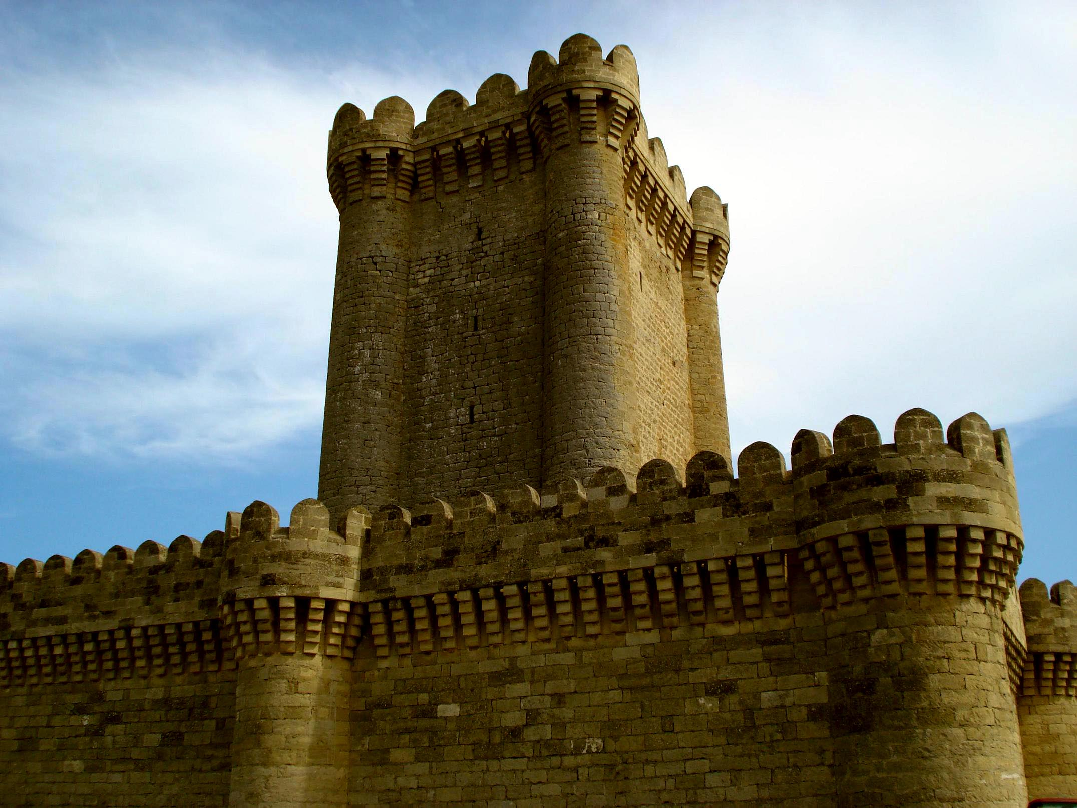 Четырехугольная башня в Мардакян